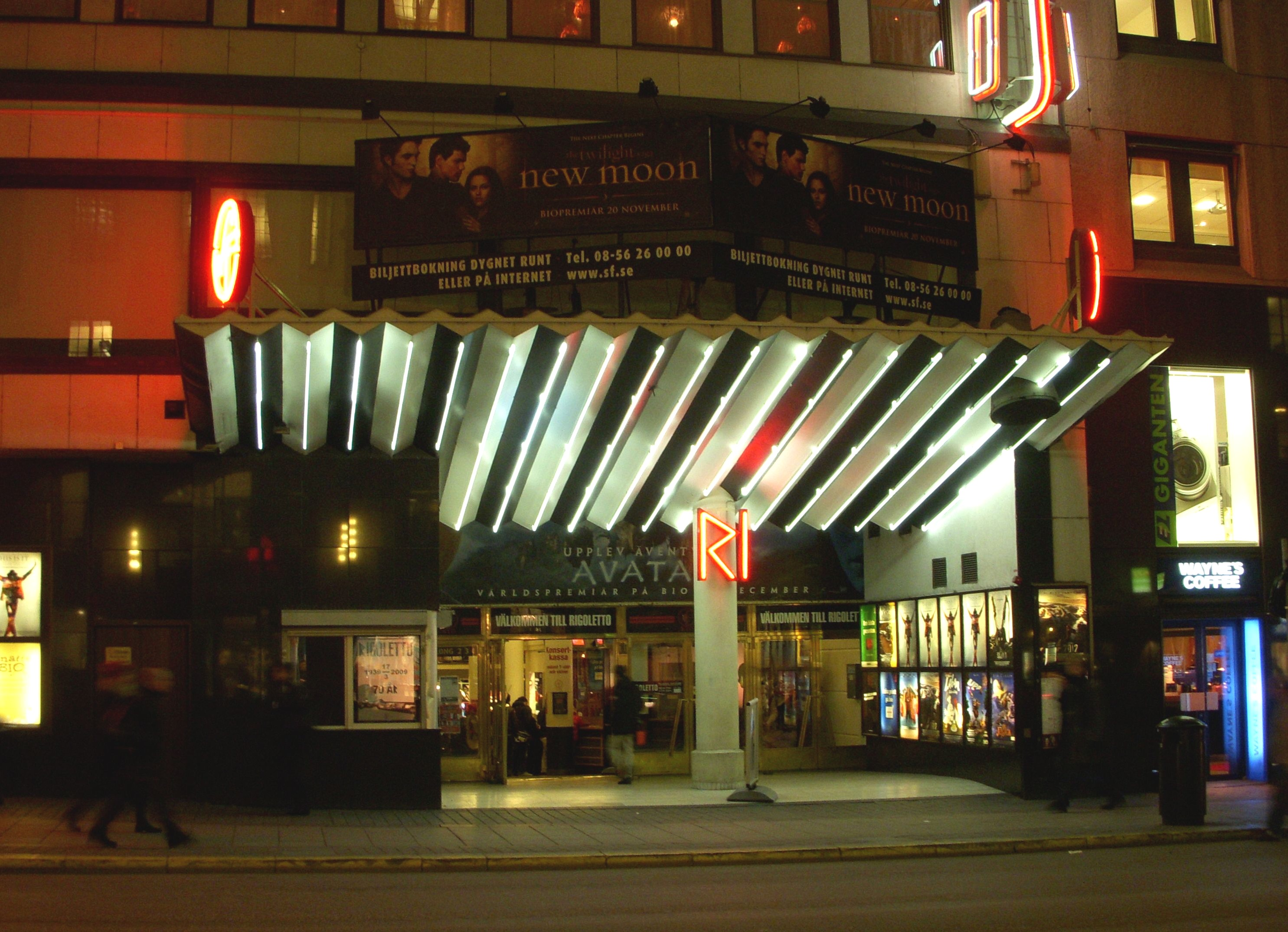 Biograf "Rigoletto" i Stockholm